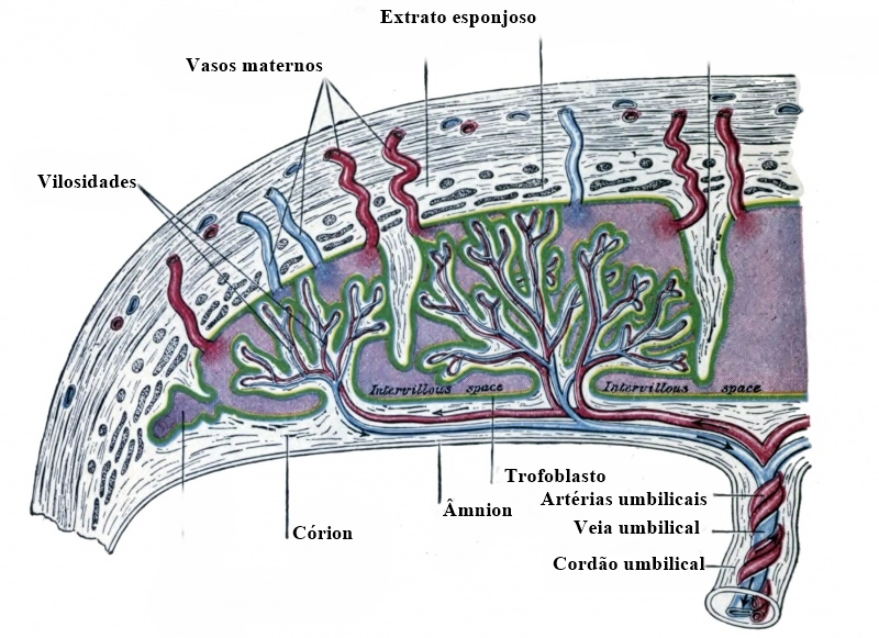 Vilosidades, lacunas, veias e arterias que irrigam o sistema placentário